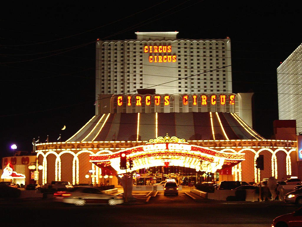 Das Kasino "Circus Circus in Las Vegas, Nevada (USA) Quelle: selbst fotografiert 2003, Mikano Lizenz: GFDL